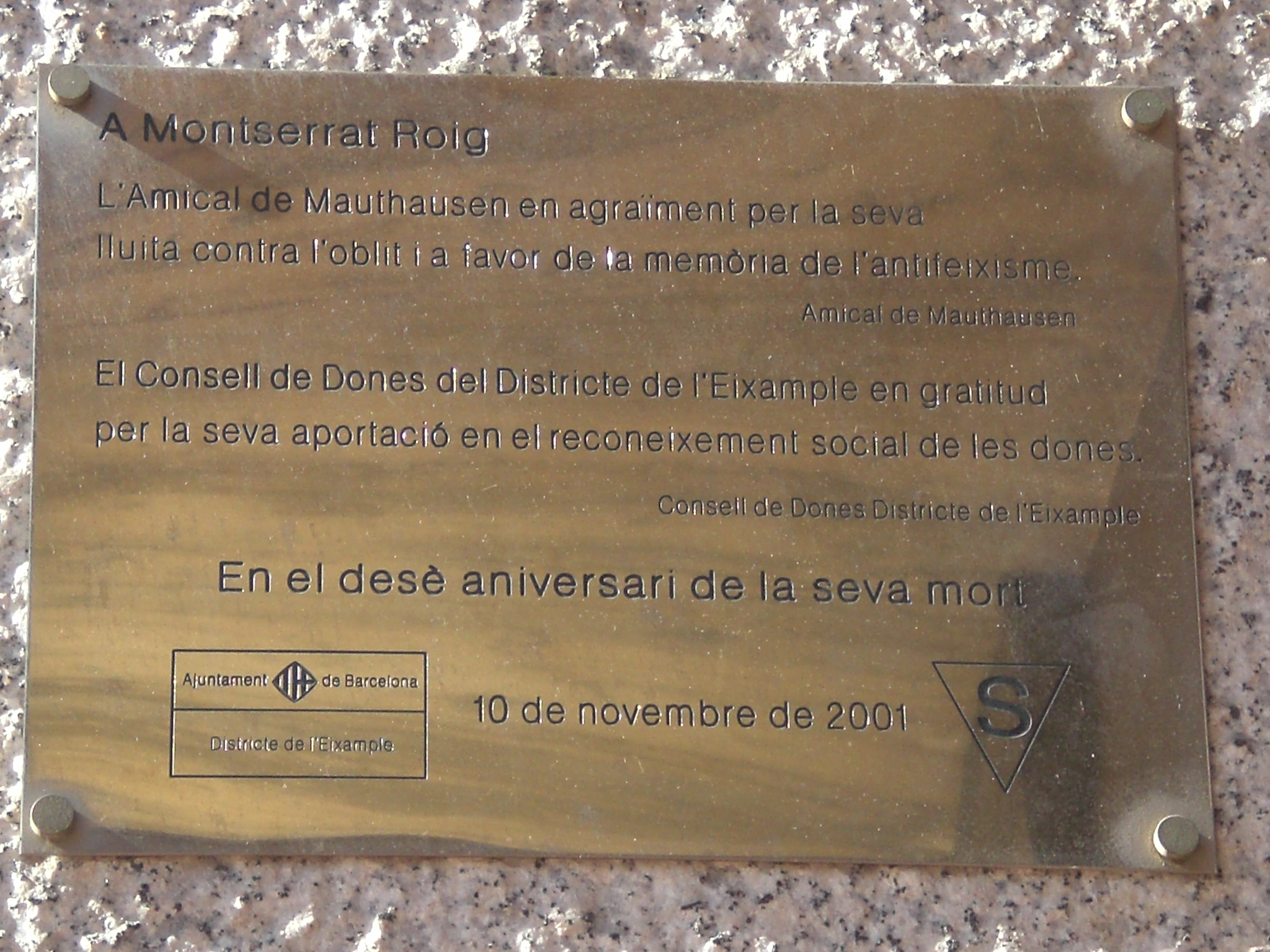 Montserrat Roig. Jardins Montserrat Roig, accés per c. Rosselló, 484 (Barcelona)